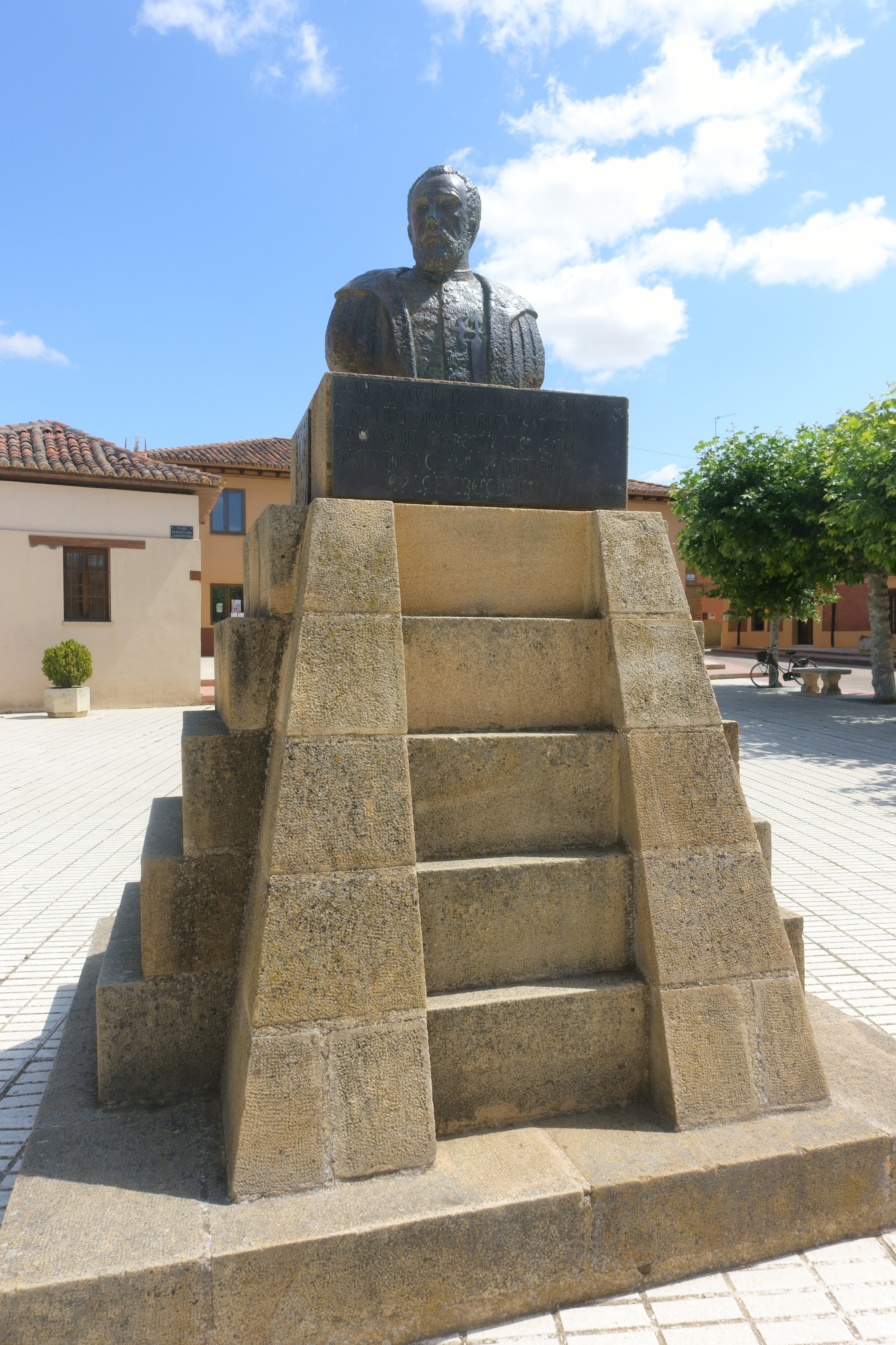 Monumento a Diego de Ordás en Castroverde de Campos (Zamora, España).